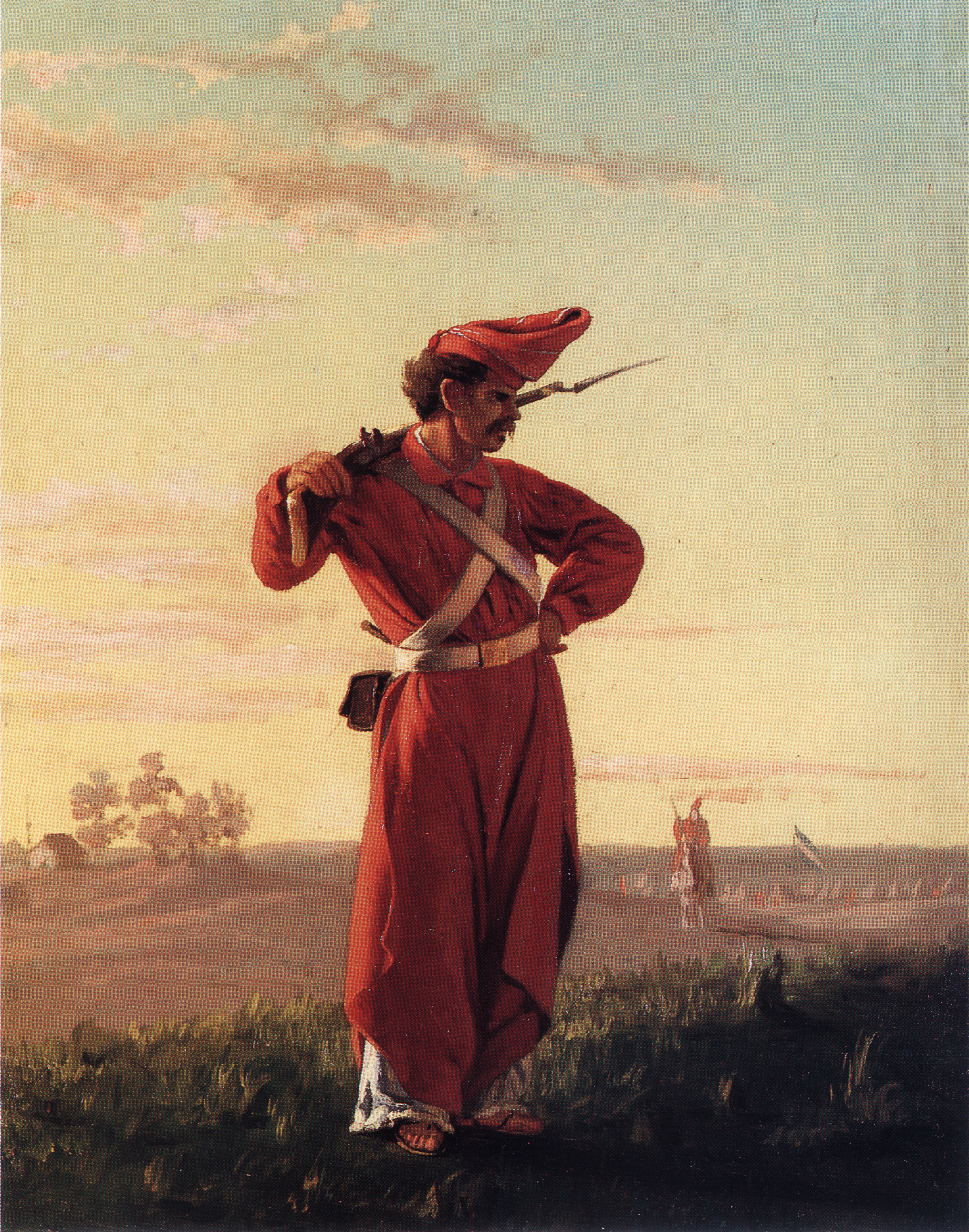 Mazorquero - s.f. - Oleo sobre tela - 39,2 x 30,7 cm - Colección particular - Buenos Aires - Argentina